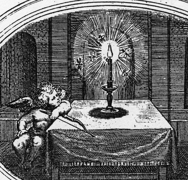 Amorum emblemata, 1608 - "Brevis et damnosa voluptas" - Emblem Book